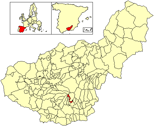 Situación del término municipal de Bubión respecto a la provincia de Granada, en España.